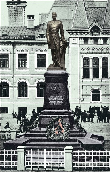 Рыбинск. Монумент работы скульптора А. М. Опекушина (утрачен)